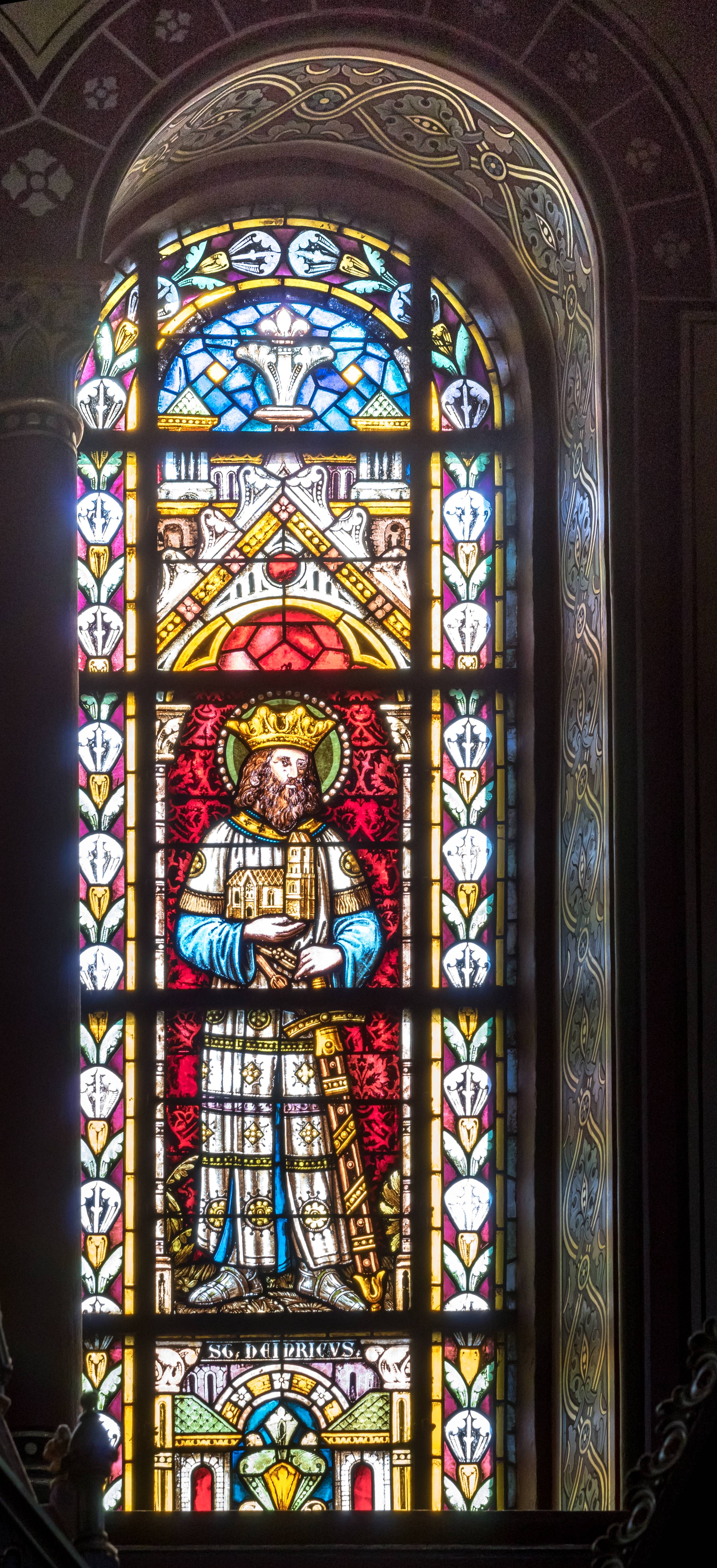 St. Peter und Paul in Bonndorf Die Glasfenster im Chor in der Kirche